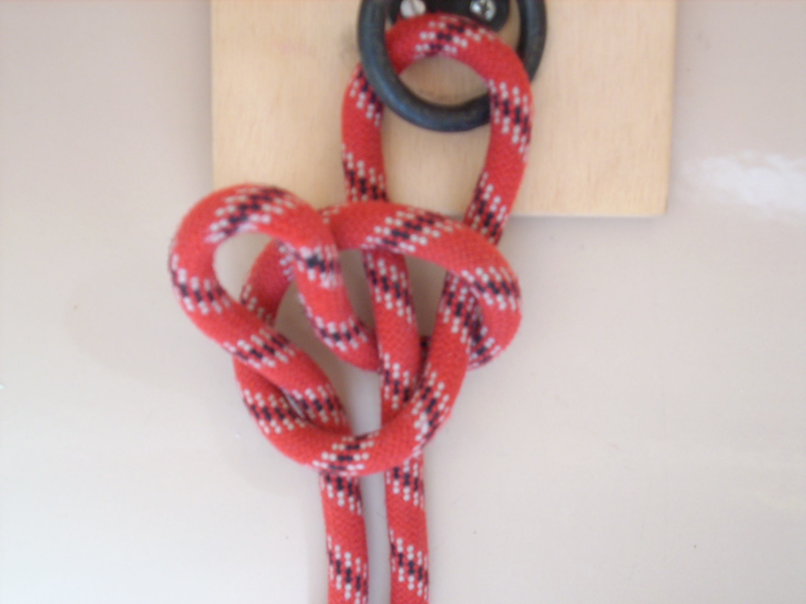 Pferdeanbindknoten: Schleife durch Auge gesteckt.